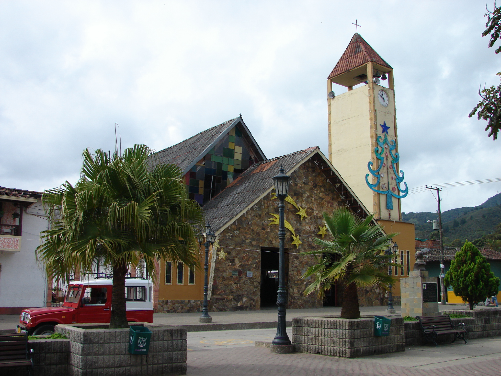 Iglesia principal en el municipio de Gómez Plata, Antioquia